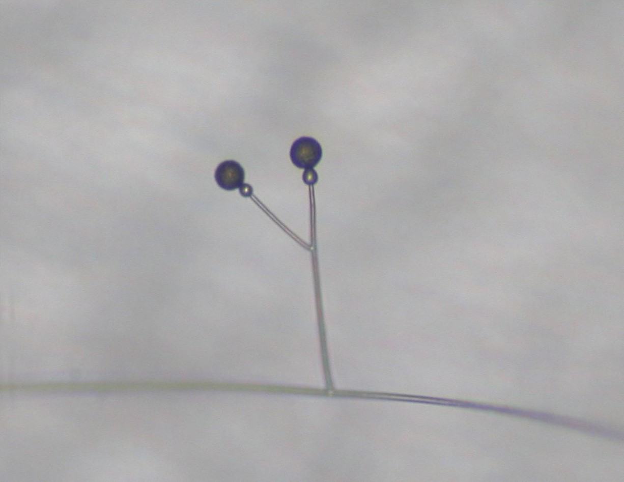 Gongronella butleri 2004/07/12 和歌山県田辺市：Tanabe City. Wakayama Pref. Japan Isolated from forest soil. on PCA, room temperature